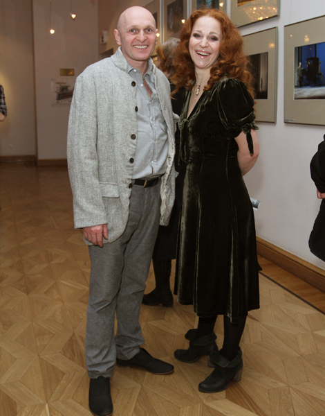 Церемония награждения премией «Золотая маска» — 2013 года.